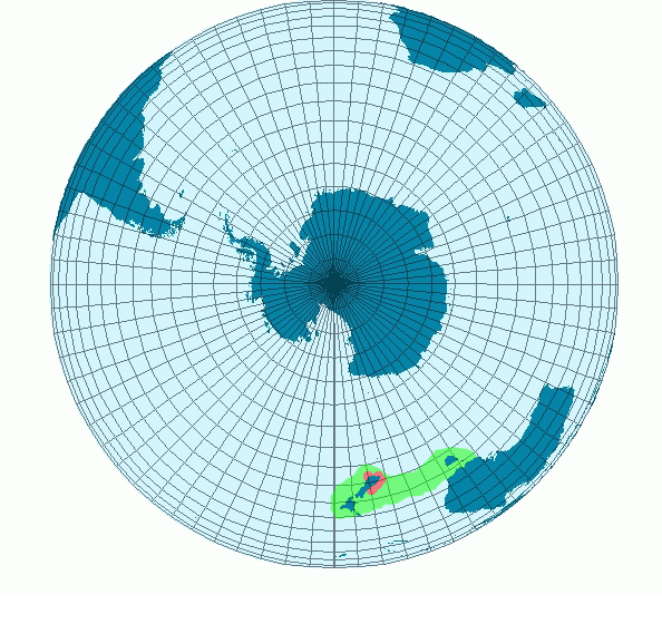 Carte représentant les zone de reproduction et d'habitation du manchot Gorfou du Fiorland. En vert, les zones où le Gorfou du Fiorland vie. En rouge, les zones de reproduction. Créer Par BRUCHET Sébastien et sous license GFDL. (Utilisation de File:MapS.png pour la création)